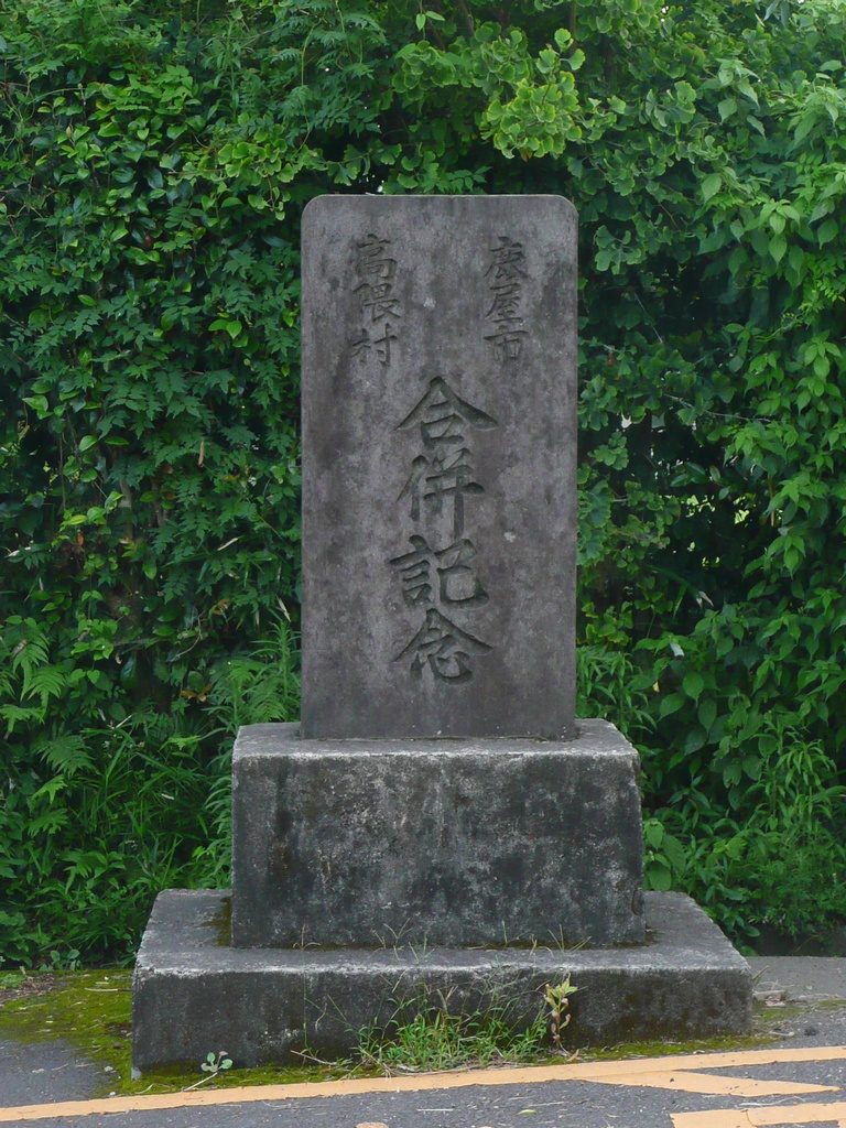 鹿屋市と高隈村の合併記念碑（鹿屋市高隈地区の消防団前）。1955年1月、昭和の大合併に伴い高隈村は鹿屋市に編入された。